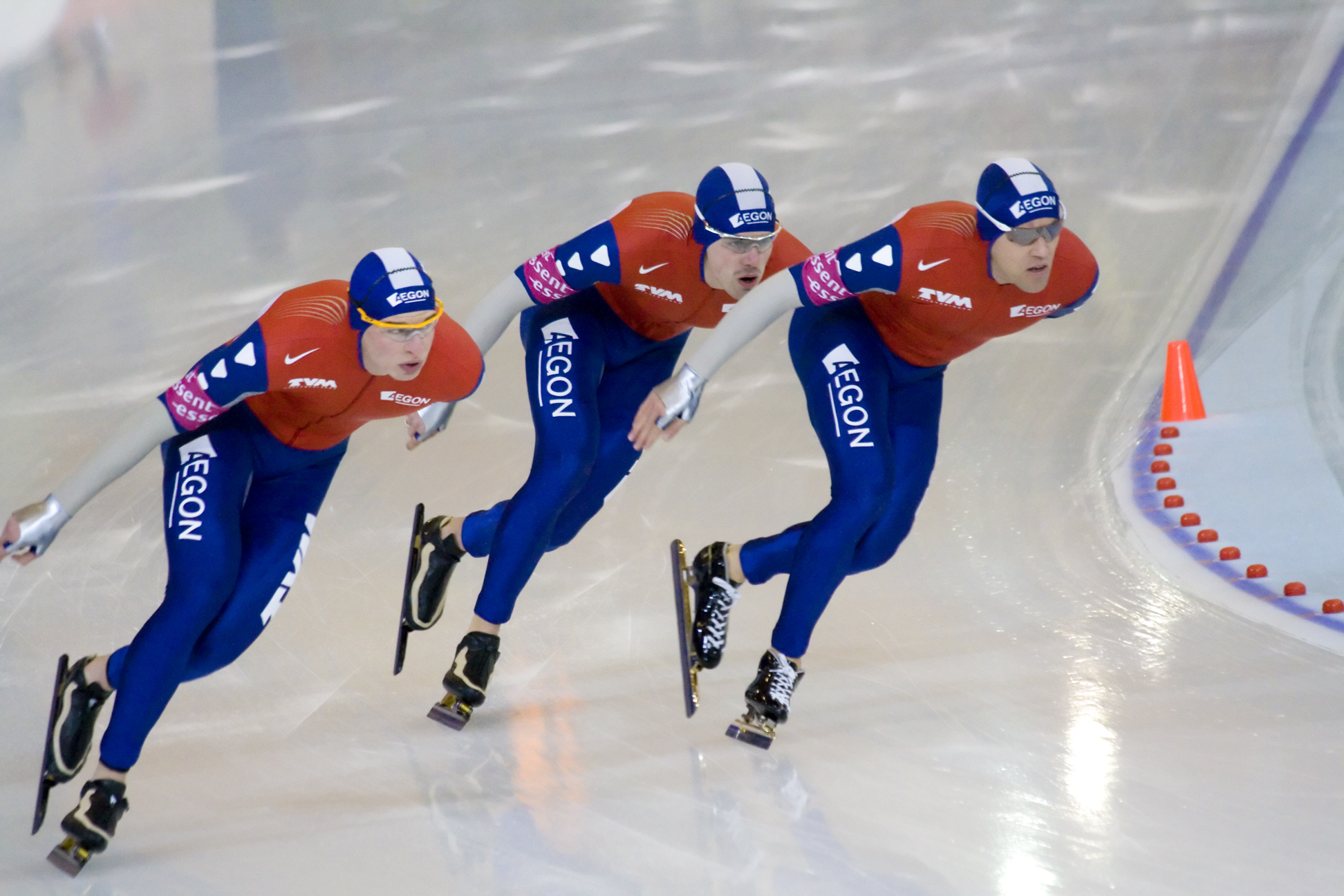 Netherlands. Sven Kramer, Wouter Olde Heuvel, Carl Verheijen